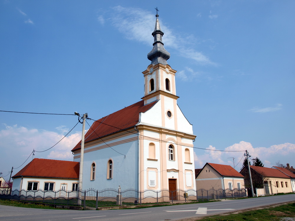 Crkva u selu Svilaj, Brodsko-posavska županija.